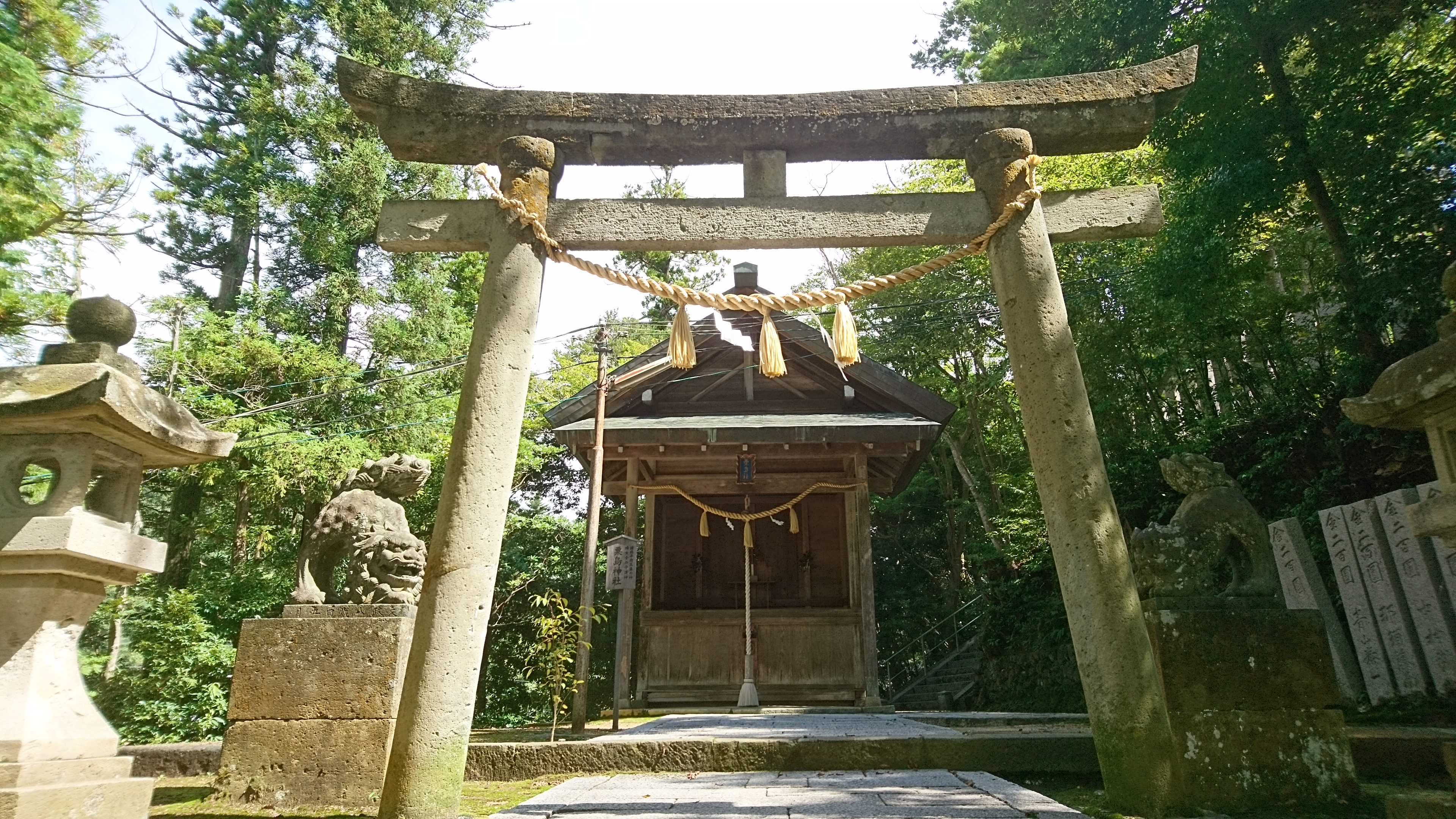 京丹後市峰山・金刀比羅神社の末社・粟嶋神社。この社殿の狛犬は、江戸期の丹後地方を代表する石工・松助のものと伝わる。